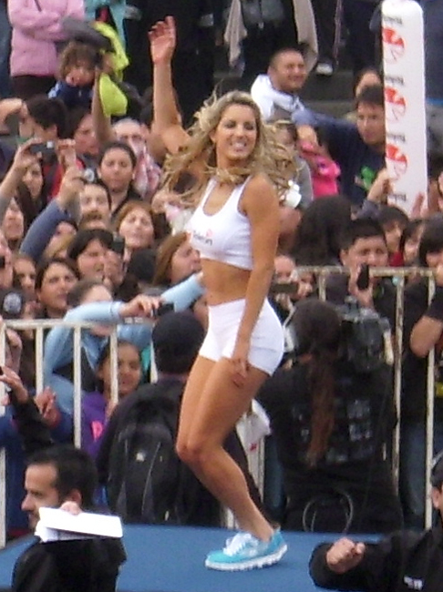 La modelo argentina Lucila Vit participando del show de la Teletón en la Plaza de Armas de Maipú el sábado 3 de diciembre de 2011.